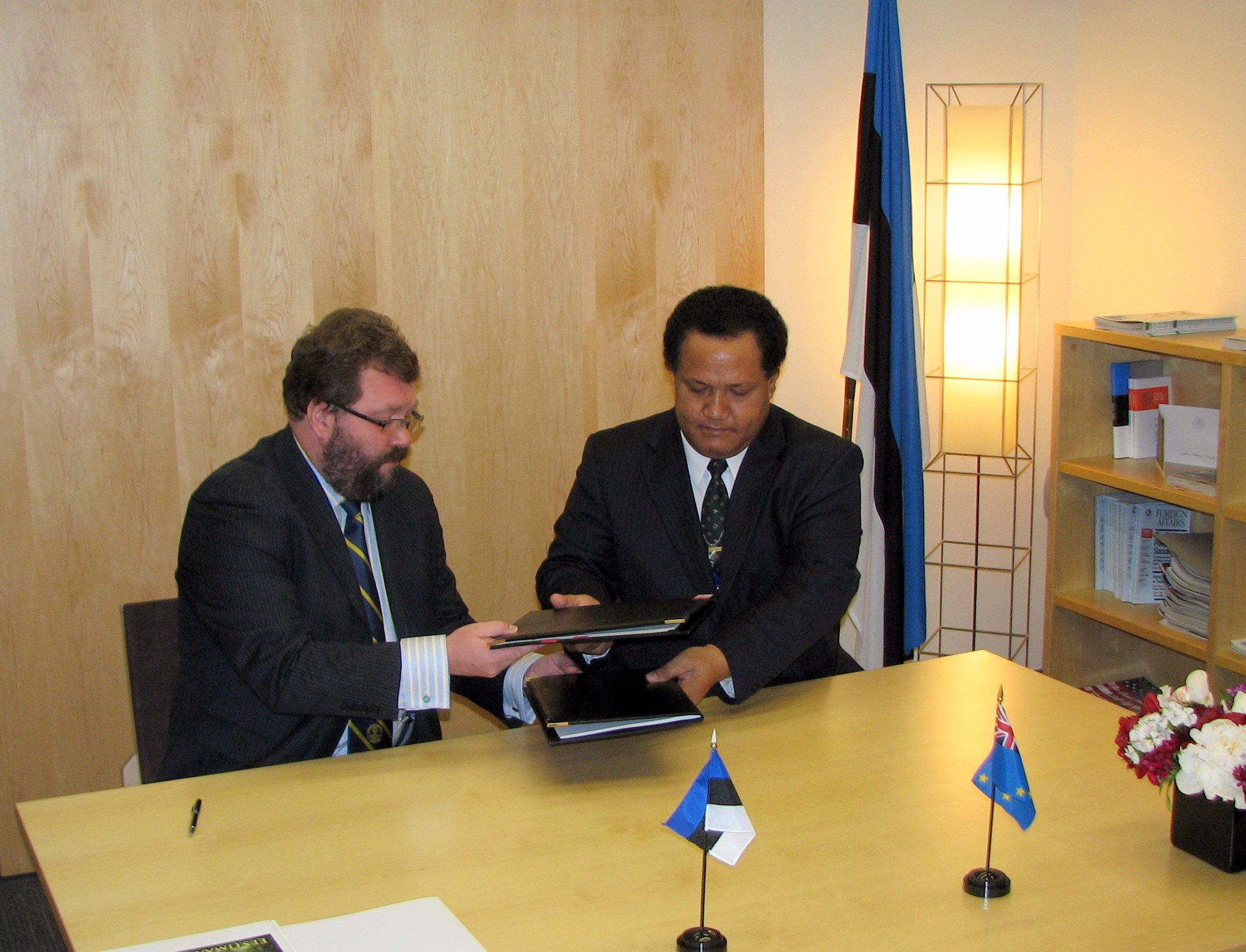 Eesti suursaadik ÜRO juures Margus Kolga sõlmis Tuvalu suursaadikuga ÜRO juures Afelee F. Pitaga Eesti ja Tuvalu vahelised diplomaatilised suhted. 25.05.2011